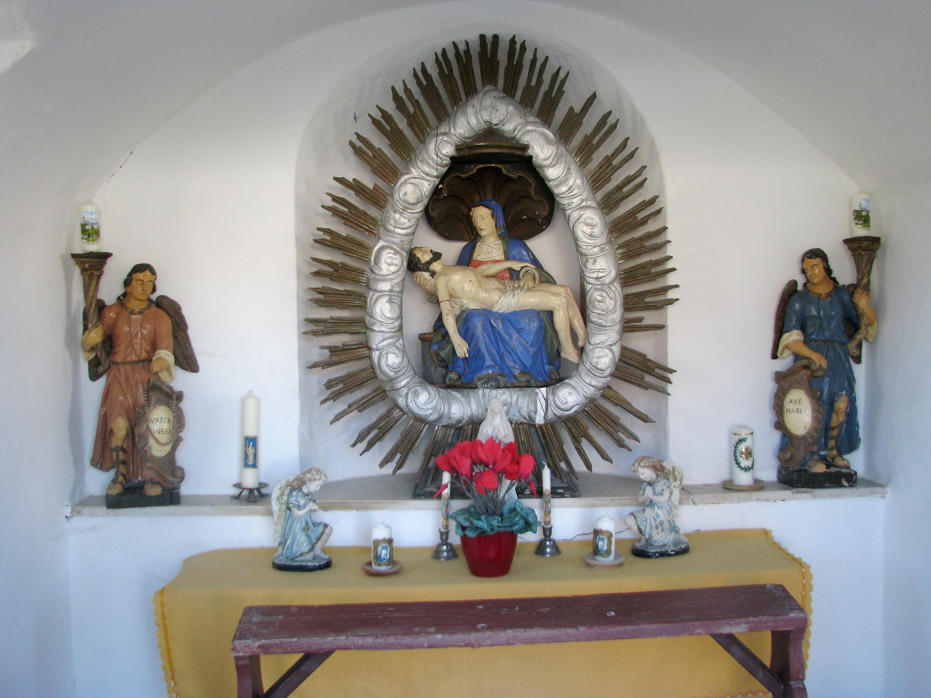 Blumenberg, Ortsteil von Eichstätt, Kapelle von 1876, Inneres